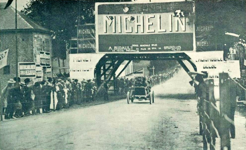 Publicité Michelin au Circuit des Ardennes 1905 (pilote Hémery, le futur vainqueur) - La Vie au Grand Air du11 août 1905, p.3